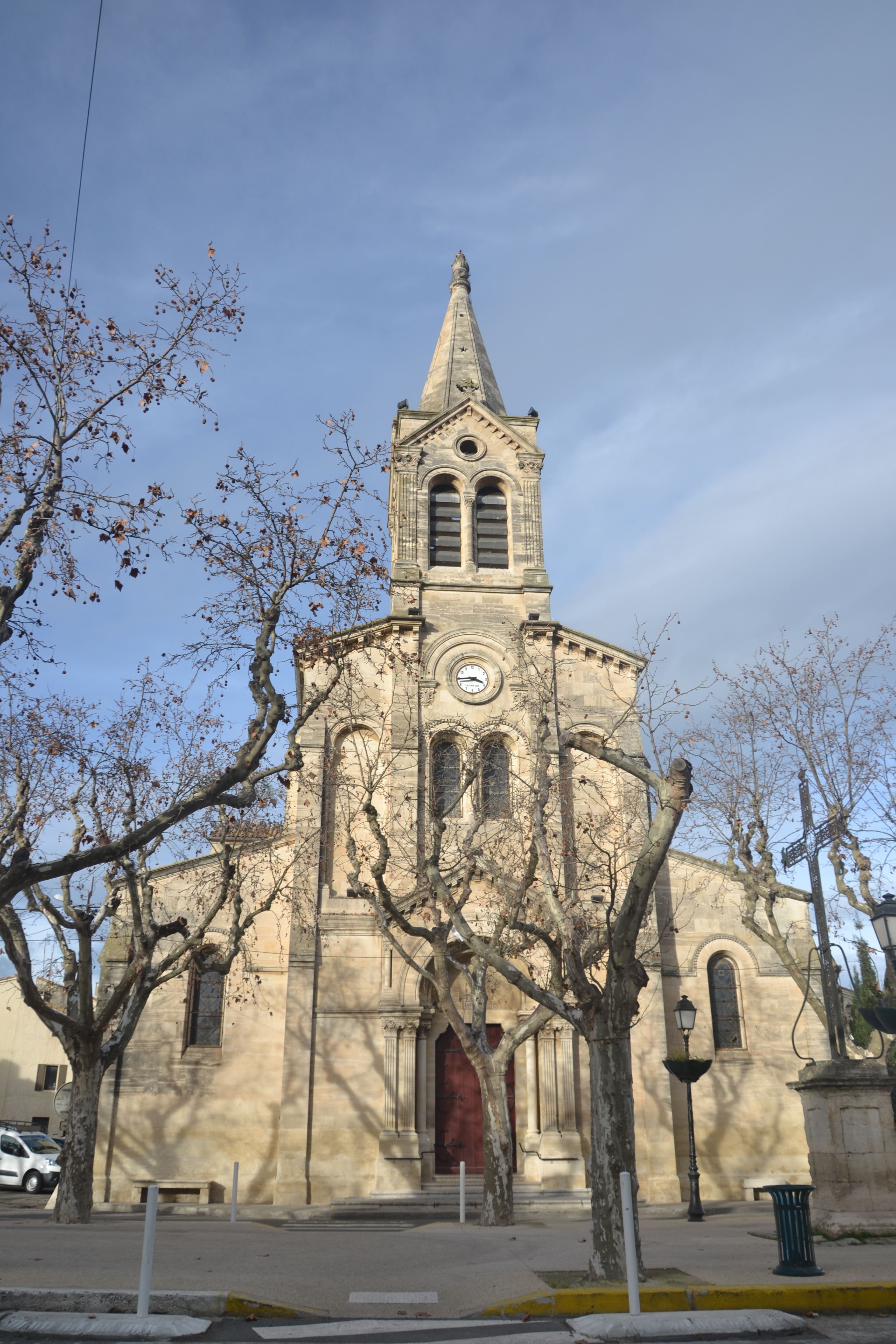 façade de l'église de Manduel